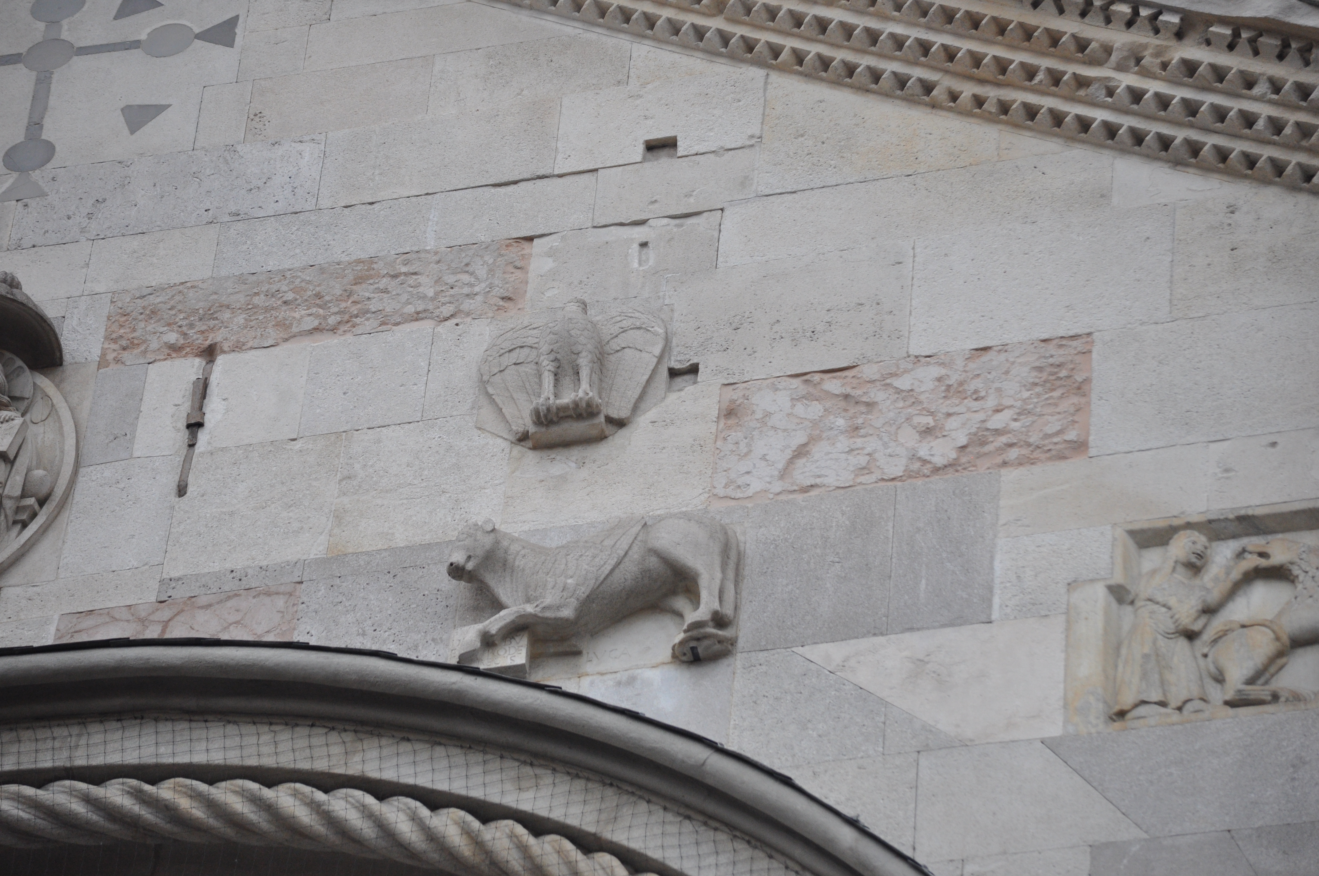 Duomo (solo esterni) This is a photo of a monument which is part of cultural heritage of Italy.